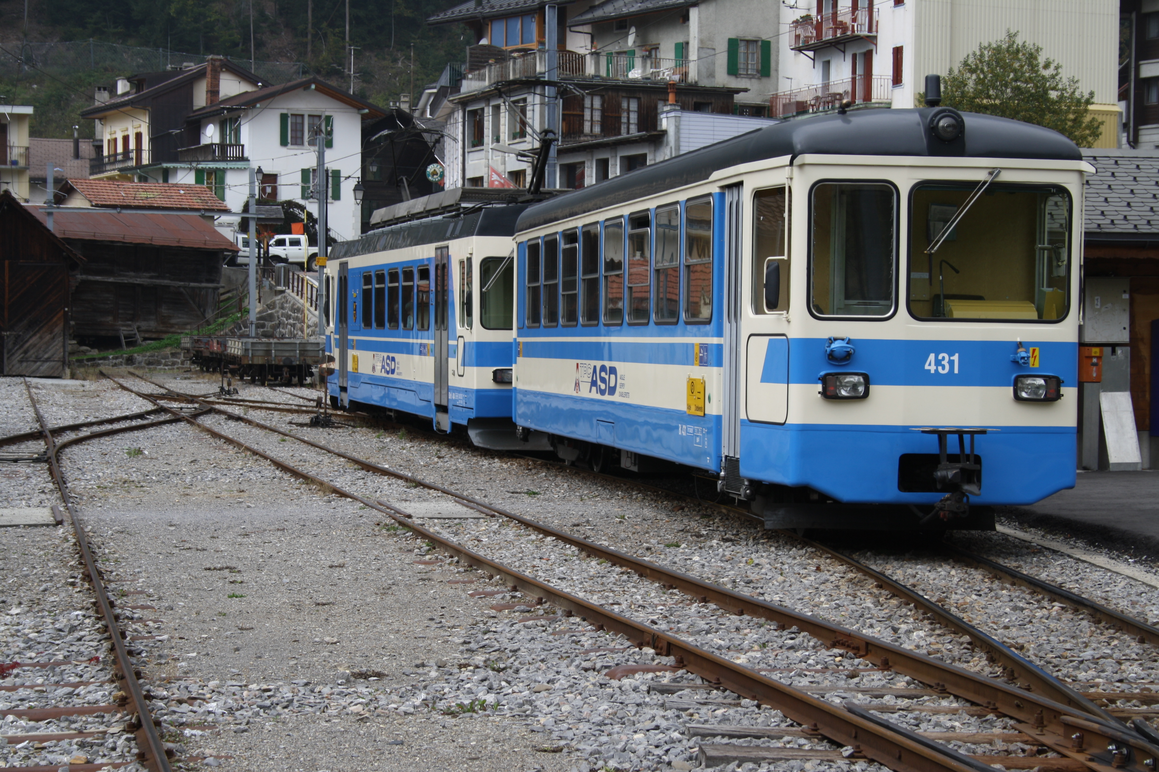 Zug im Bahnhof Le Sépey